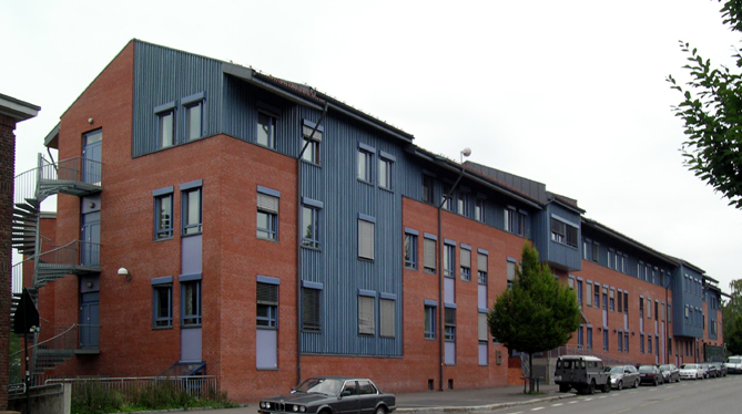 Jordal skole, Oslo.